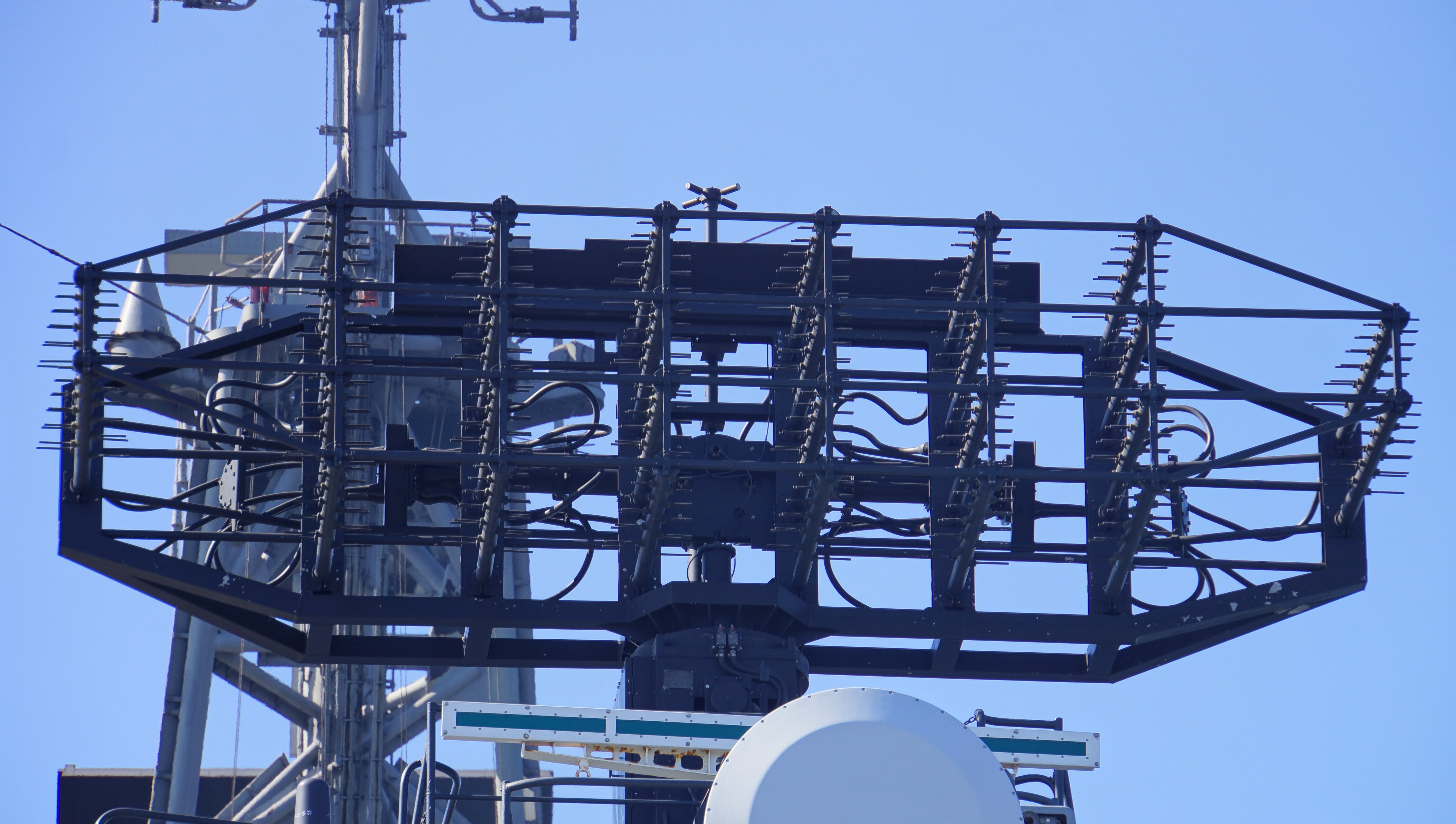 海上自衛隊 ミサイル護衛艦はたかぜ（DDG-171）艦上のOPS-11C 2次元対空捜索レーダー 正面。 14年10月19日 堺泉北港にて。